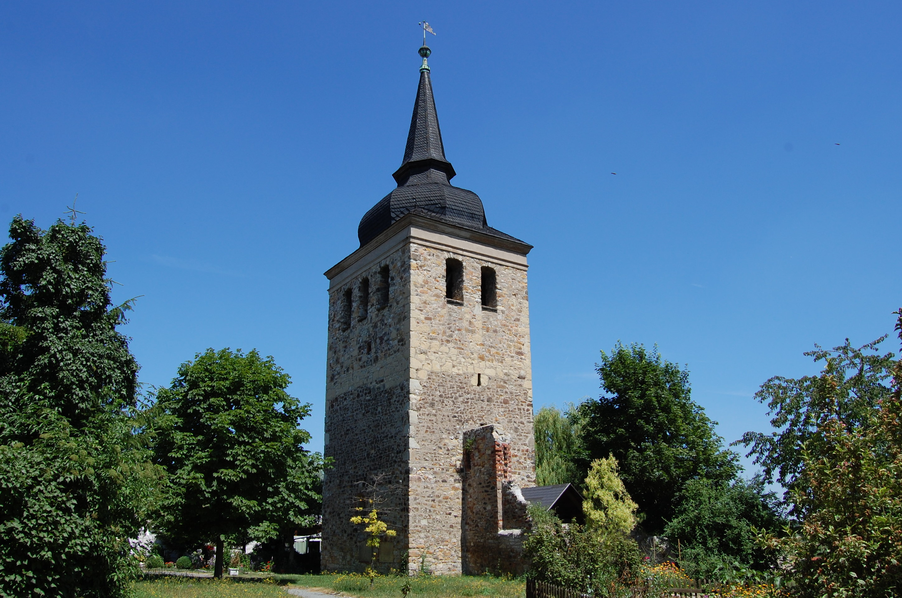 Kirchturm der Sankt Stephanus Kirche in Magdeburg-Westerhüsen